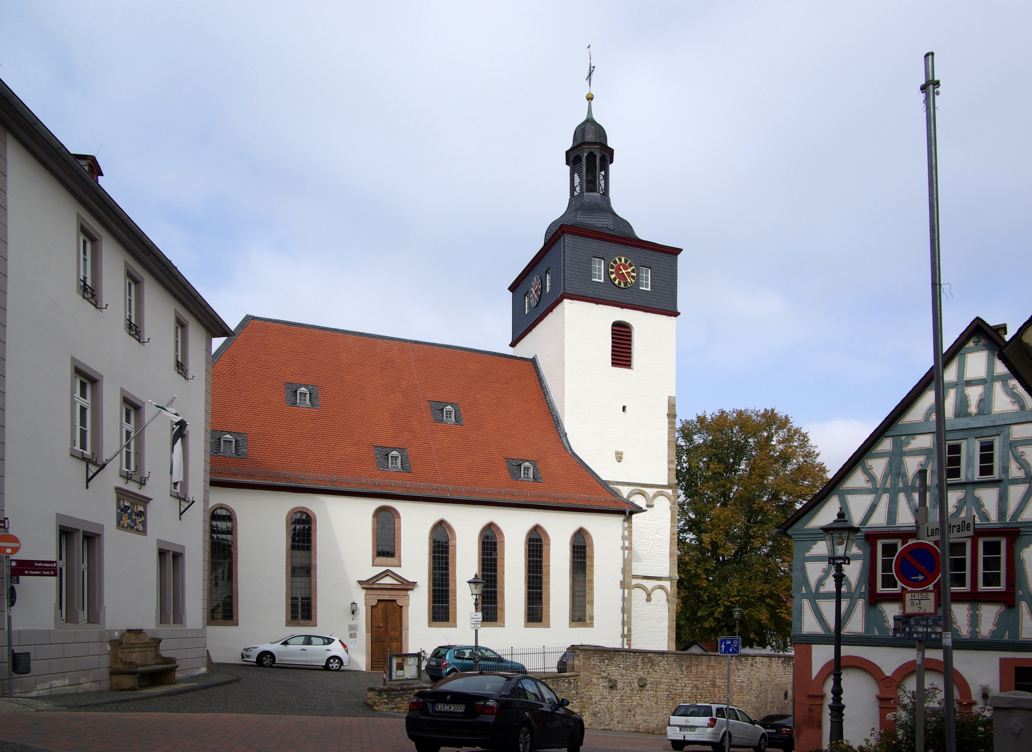 Kirchheimbolanden, Mozartstraße 8: Protestantische Pfarrkirche (Peterskirche); romanischer Chorturm, 12. Jahrhundert, Erhöhung wohl im 17. Jahrhundert, Obergeschoss und Helm 1932, Architekt Eugen Dick; im Kern spätgotisches Langhaus, Erweiterung wohl in der ersten Hälfte des 18. Jahrhunderts, Treppenanbau, bezeichnet 1630, teilweise Fachwerk; Ausstattung; ortsbildprägend